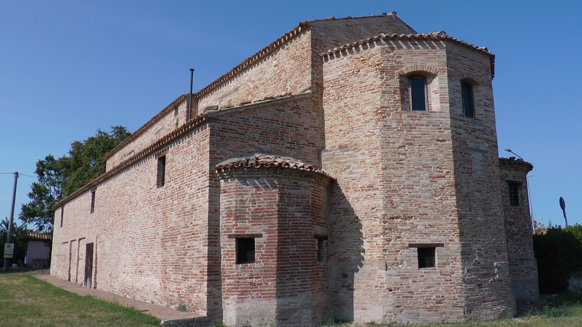 L'Abbazia di San Gervasio (V-VI sec.) sorge al centro di un'area archeologica. Il suo titolo ha un chiaro riferimento alla Bulgaria, denominazione risalente all’alto medioevo e all’insediamento di popolazioni barbariche in questo tratto del basso Cesano. This is a photo of a monument which is part of cultural heritage of Italy.